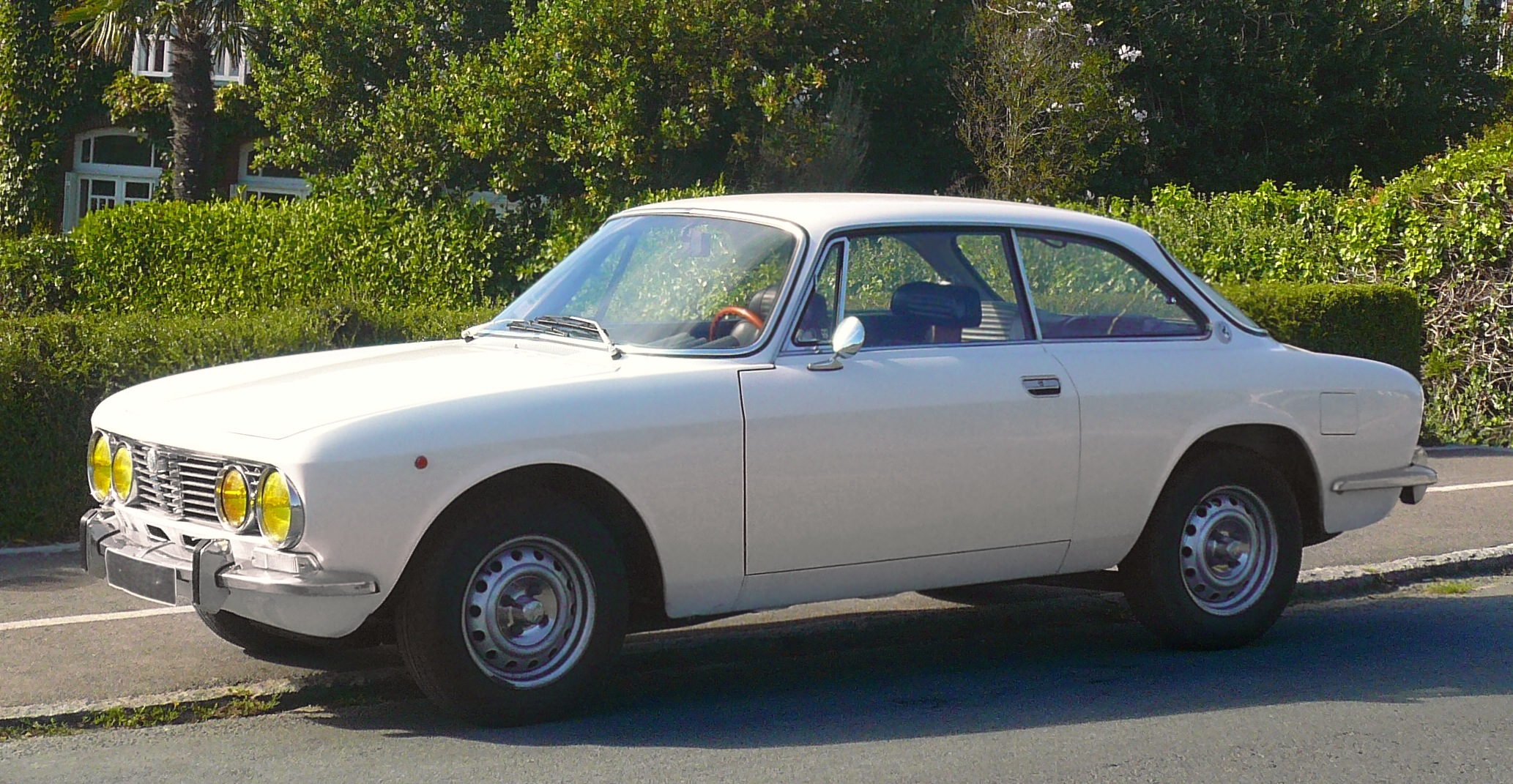 Une Alfa Romeo Giulia GT 2000 (ou coupé Bertone) sur la côte d'Émeraude en Bretagne.